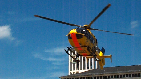 ADAC Rettungshubschrauber Christoph 16 beim Start, im Hintergrund das Rathaus Saarlouis.